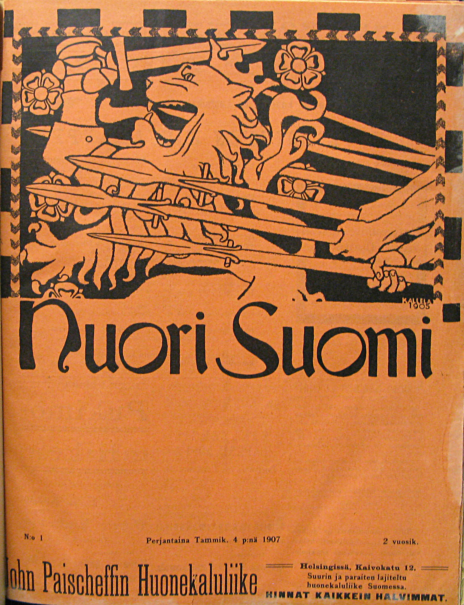 Nuori Suomi oli Helsingissä vuosina 1905 - 1907 ilmestynyt nuorsuomalainen viikkolehti. Kansilehden oli suunnitellut Akseli Gallen-Kallela.